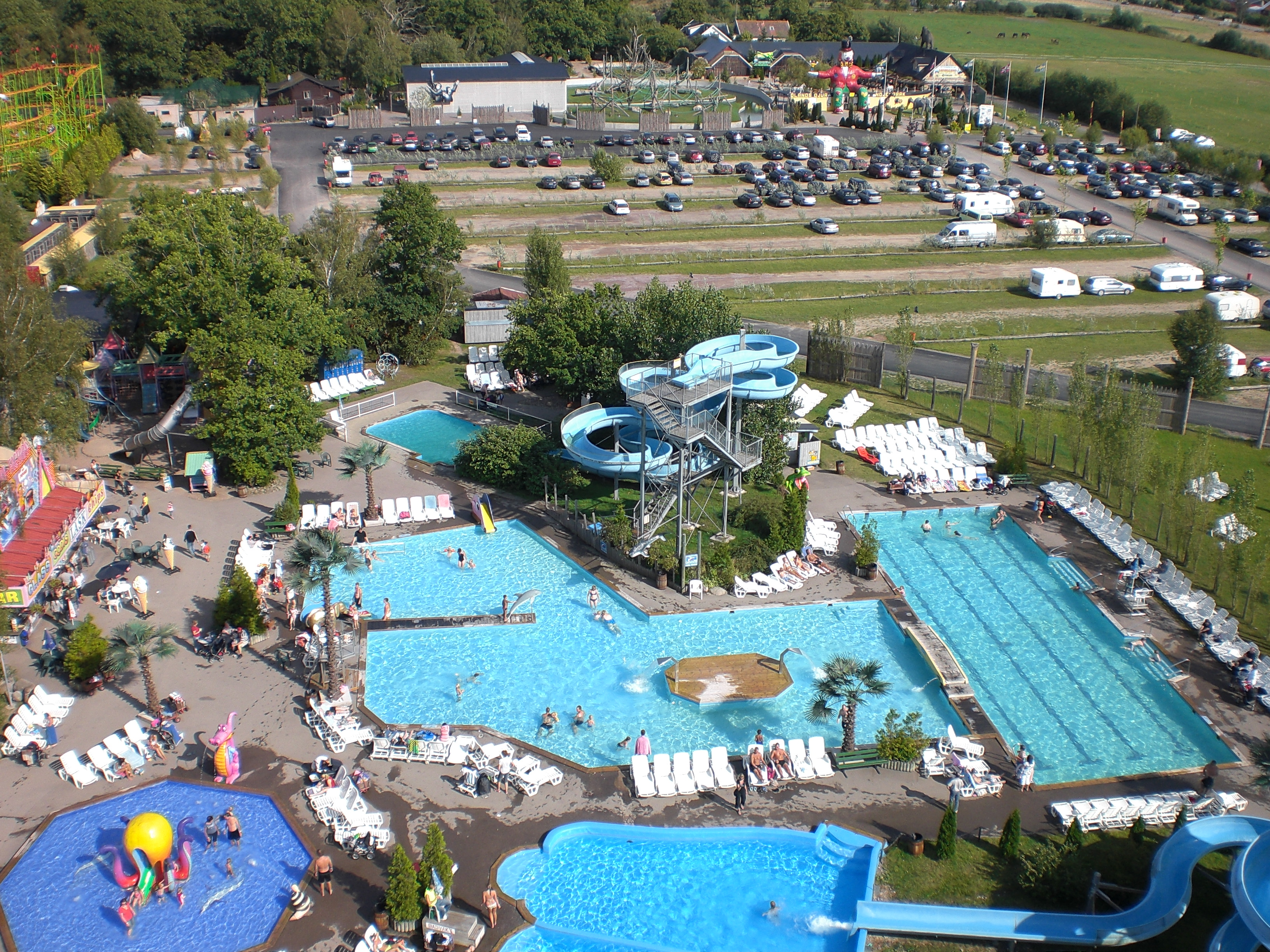 Ölands Tier- und Freizeitpark, Blick vom Riesenrad nach Osten, im Vordergrund das Spassbad Vattenland, rechts der Parkplatz und der Eingangsbereich des Parks